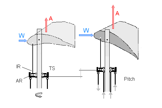 Commande de pas collectif d'hélicoptère